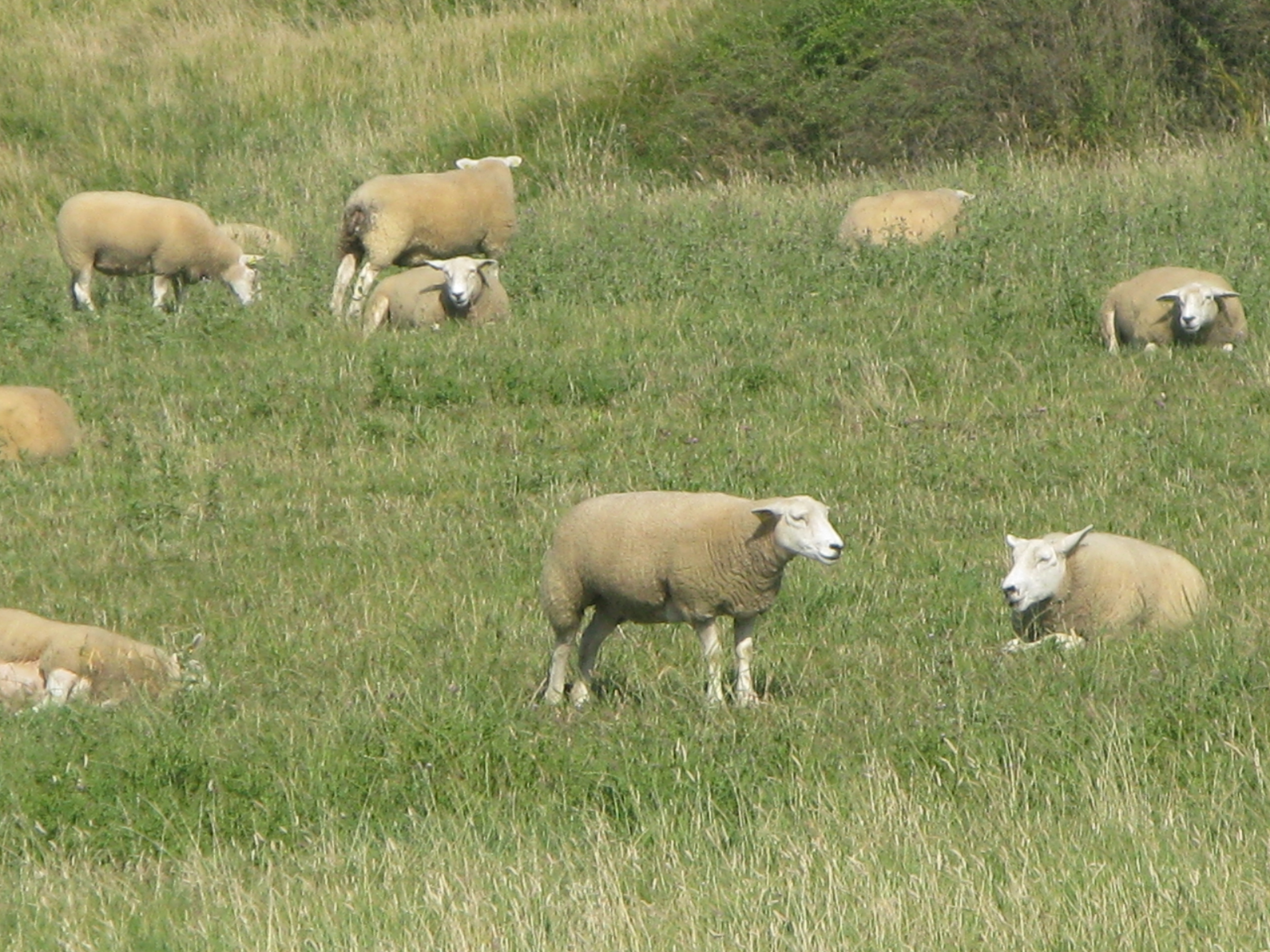 Moutons (ovis aries) sur le cap Gris-Nez.